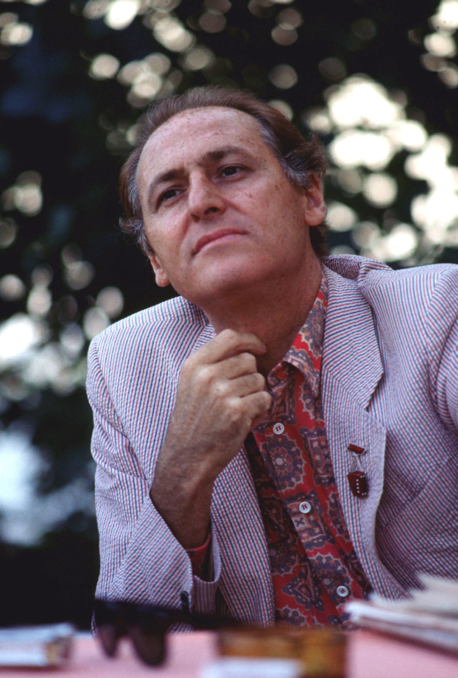 nel 1983